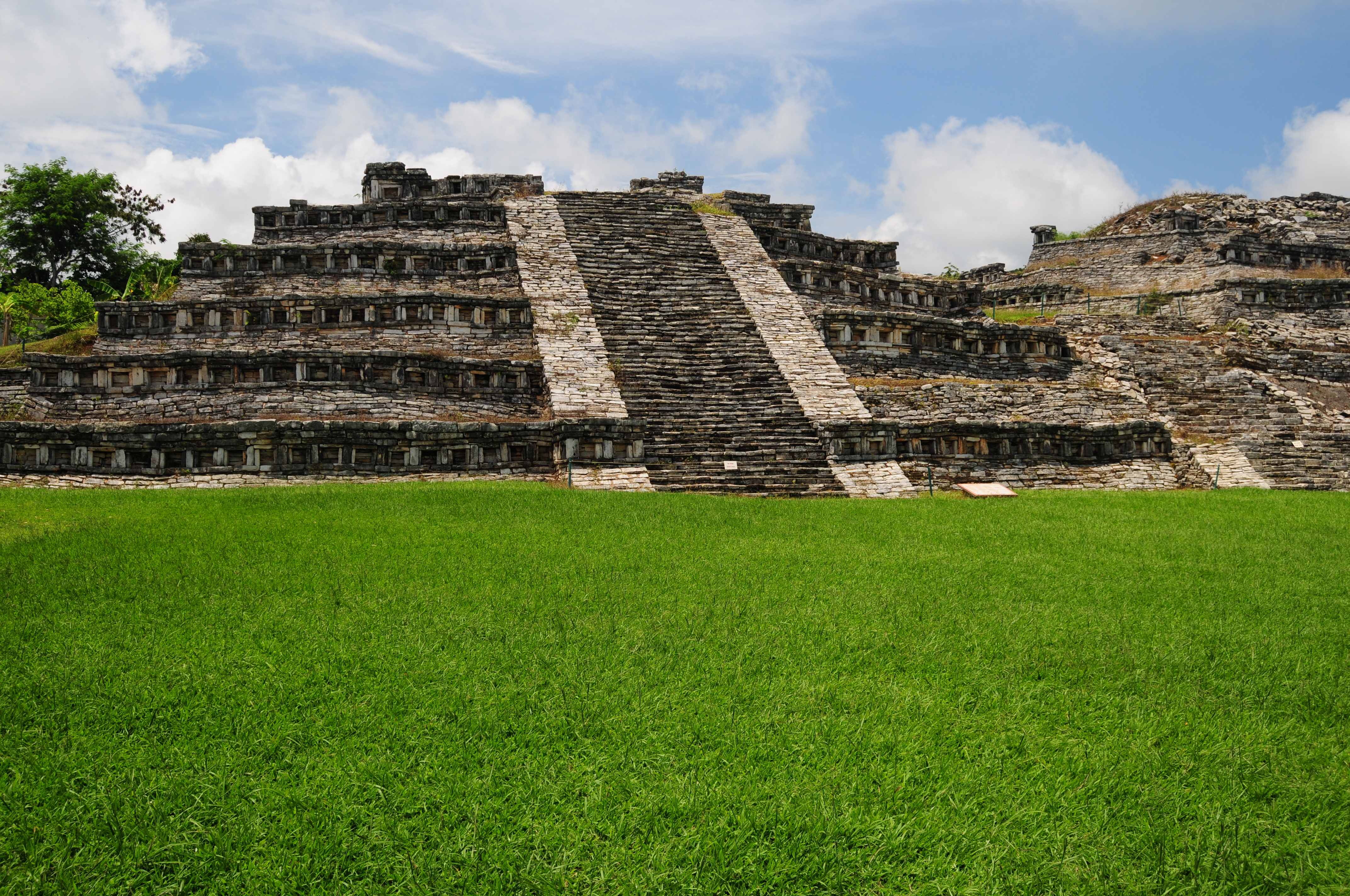 Yohualichan